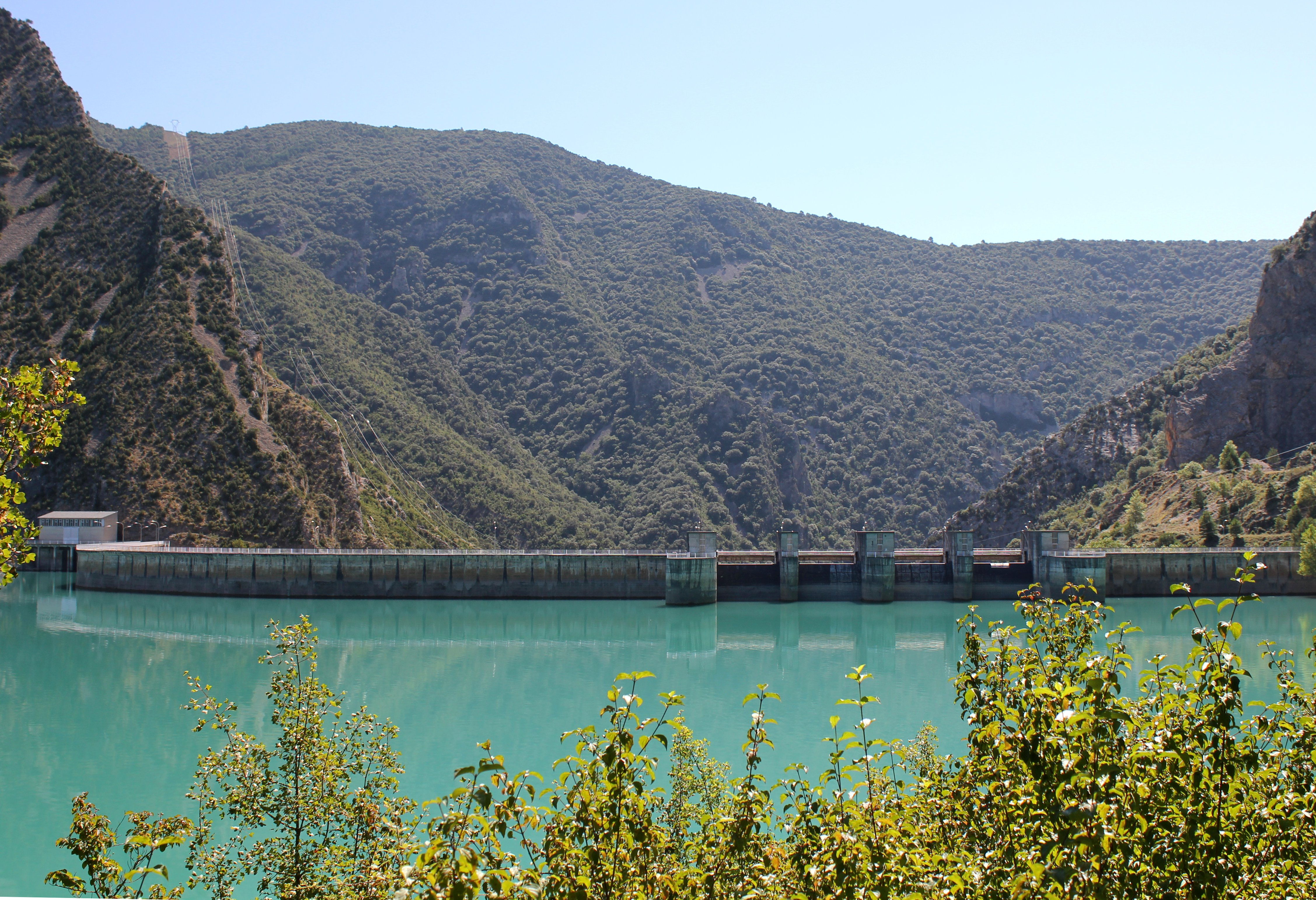 Aragonés: A presa de l'embalse de Mediano.